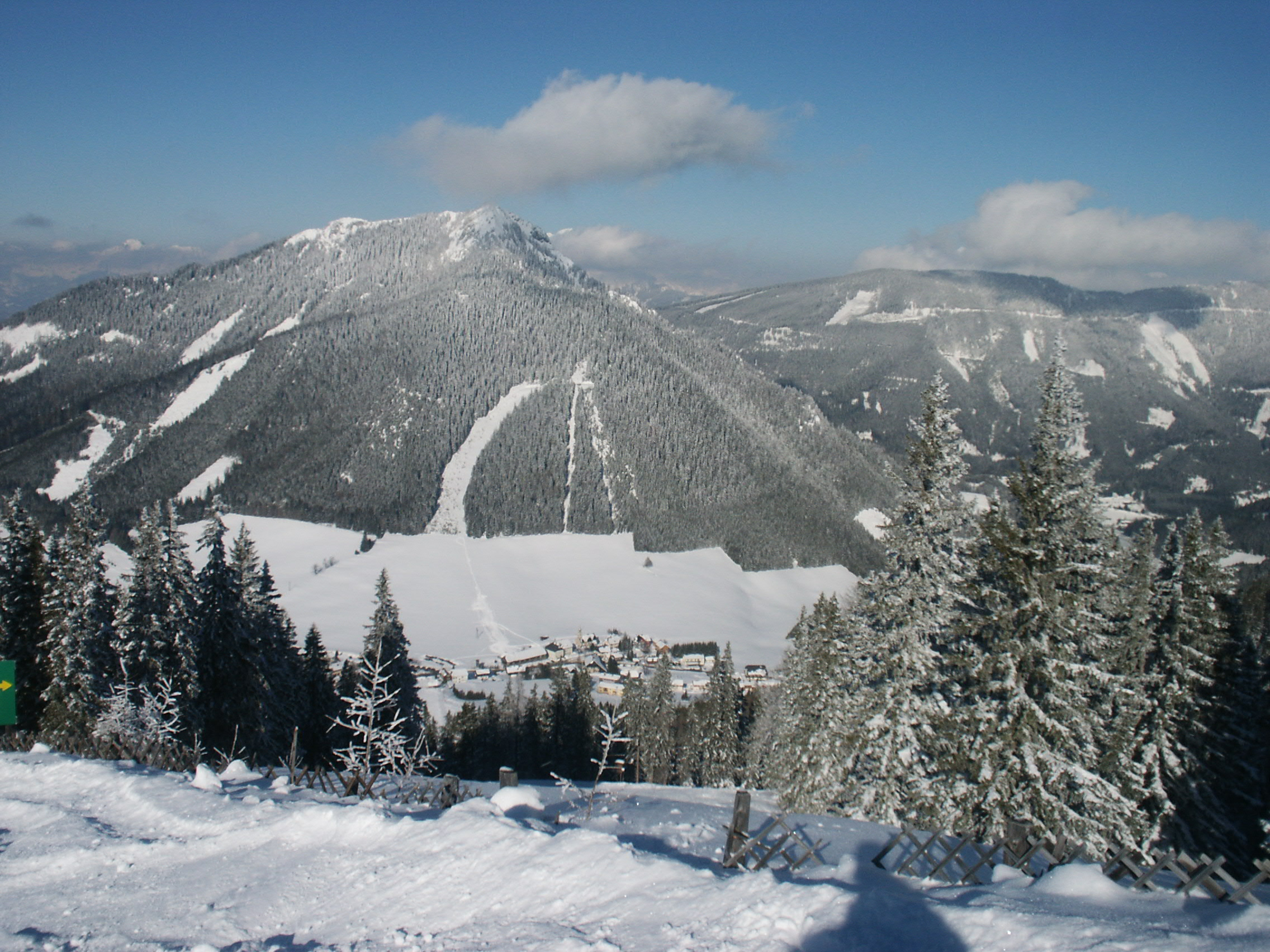 Der Ort Hohentauern vor dem Triebenstein, vom Wirtsgupf aus; hinten Paltental bei Trieben und die Eisenerzer Alpen (Lahngangkogel/Wagenbankberg).